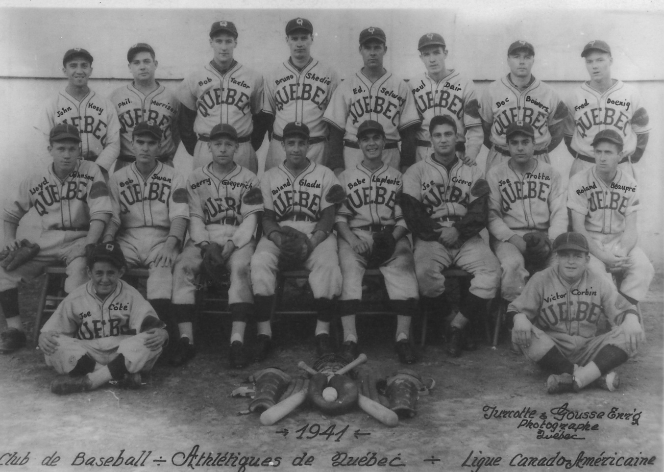 Quebec Athletics Team Photo 1941